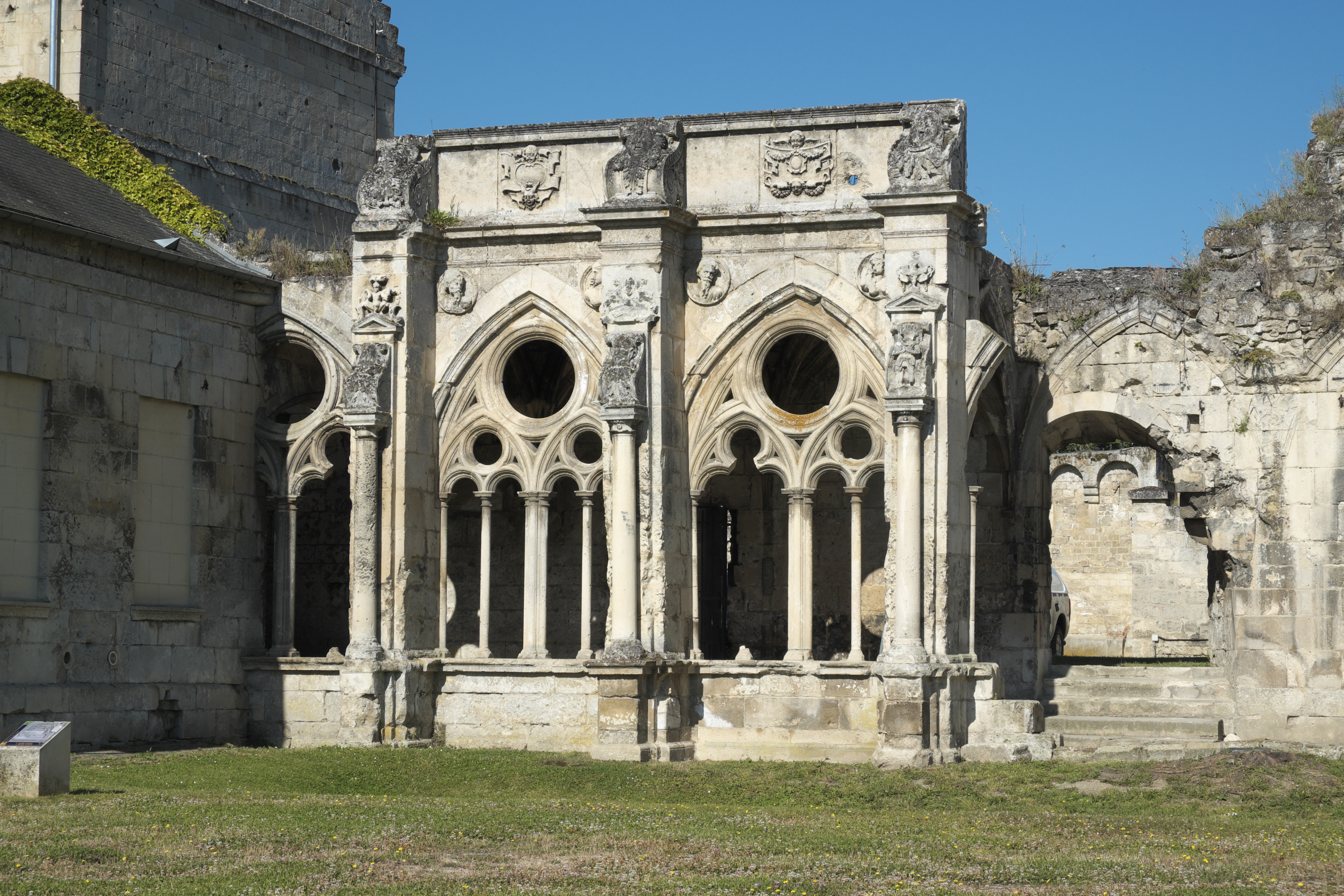 Kleiner Kreuzgang der ehemaligen Abtei Saint-Jean-des-Vignes in Soissons im Département Aisne (Picardie/Frankreich) mit Renaissance-Dekor